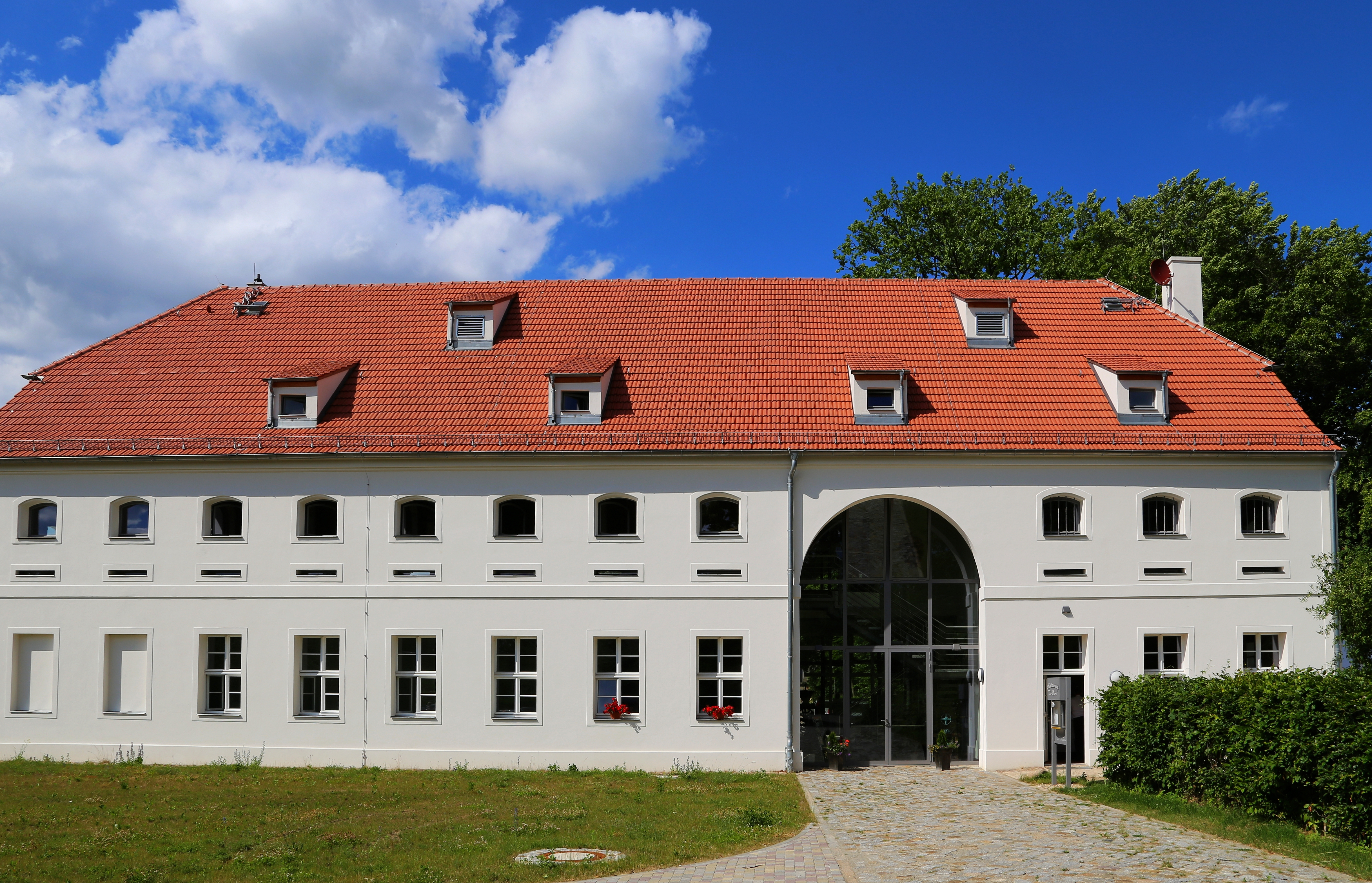 Die Darre, Bürgerzentrum der Stadt Lieberose, Landkreis Dahme-Spreewald, Brandenburg, Deutschland. Die alte Darre des Schlosses Lieberose ist in den Jahren 2009 bis 2011 restauriert beziehungsweise neu aufgebaut worden. Seit der Einweihung 2012 dient sie als Bürgerzentrum der Stadt. In dem Gebäude sind nun die Tourist-Information, ein Darre- und Forstmuseum, ein Bürgersaal und das Restaurant „Zur Darre“ untergebracht.